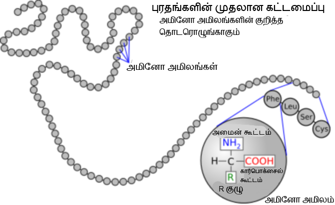 புரதங்கள் அமினோ அமிலங்களால் ஆனவை